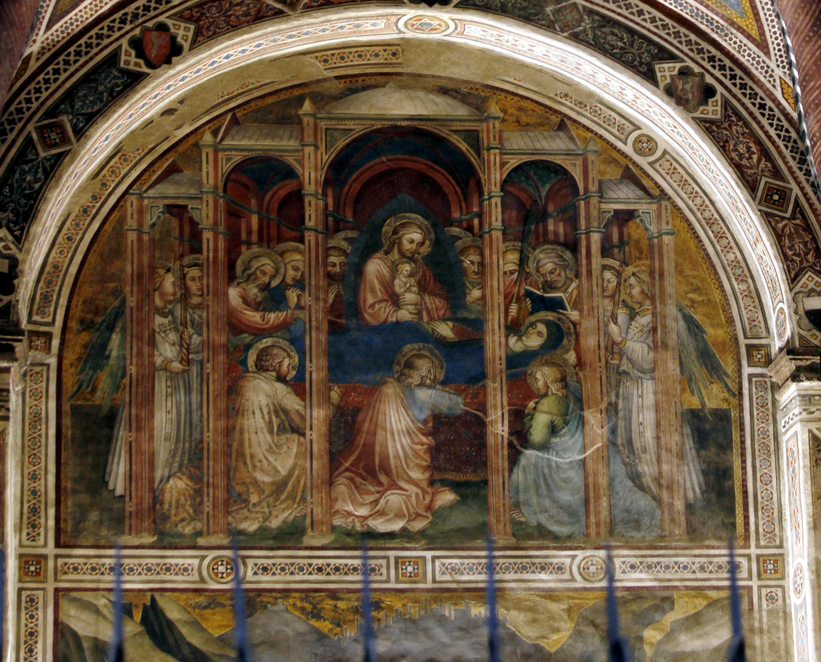 Palazzo Pubblico - Siena